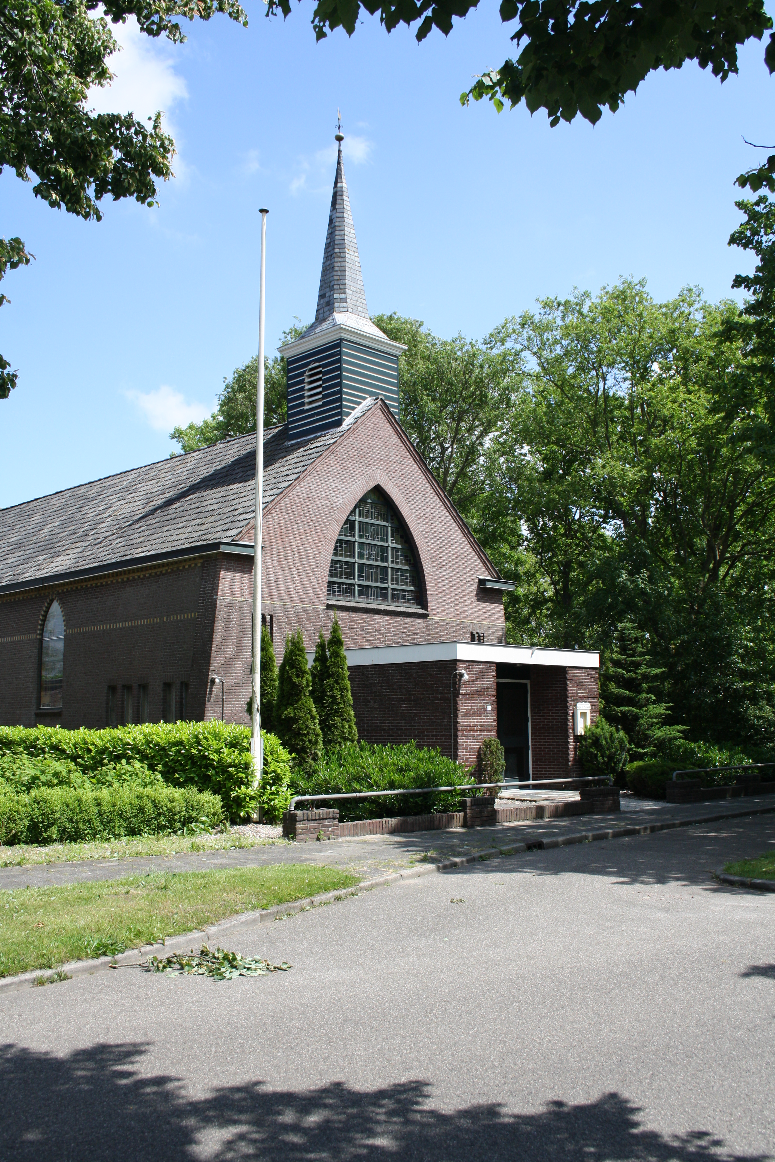 Idskenhuizen - hervormde kerk - Anno 1889